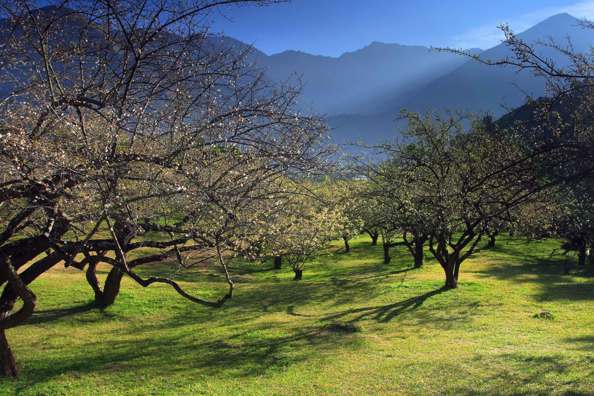 六點初從家裡出發，不到八點就到了梅園。斜光映照著梅樹，鳥語花香，整座梅園猶如是屬於我的。不過別被我的相片給騙了，這梅園陸續湧入大批人潮，所以如果晚一點到，就沒有這種意境，會有「擠百人」熱鬧的感覺。